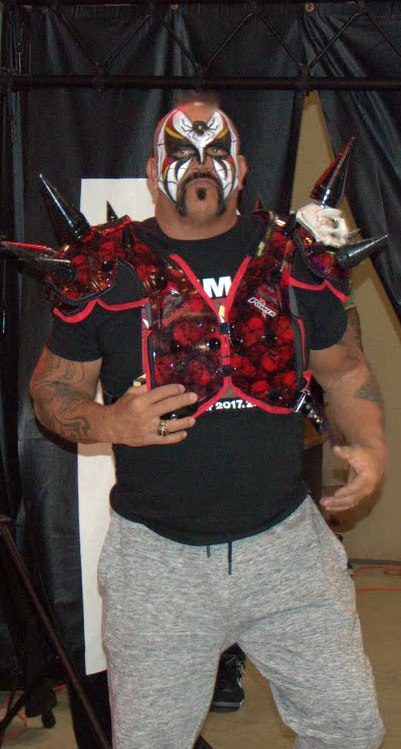 Le catcheur Road Warrior Animal en 2017.